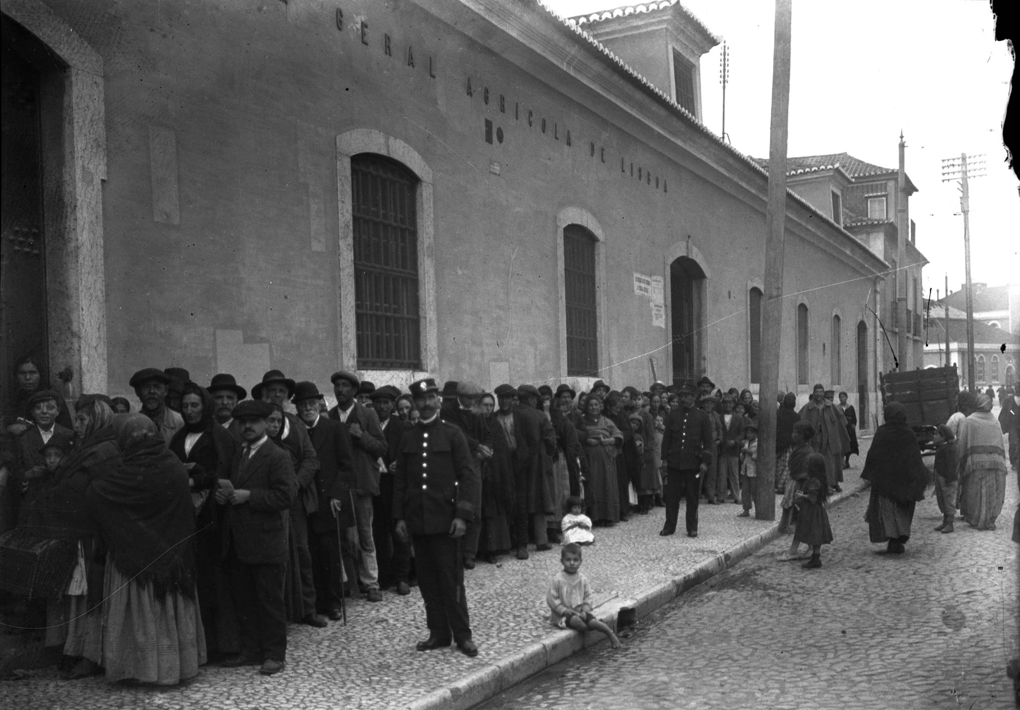 Título: Fornecimento de géneros alimentícios distribuídos e tabelados pelo Governo num armazém na Junqueira da Assistência 5 de Dezembro Dimensão: 9 x 12 cm Suporte: Negativo de gelatina e prata em vidro Nota de publicação : Ilustração Portuguesa, 1918, 18 de Novembro, p. 419 Portugal Século XX - Crónica em Imagens 1920-1930, Joaquim Vieira, Círculo de Leitores 1999 PORTUGAL. Comissão Nacional para as Comemorações do Centenário da República. Viva a República 1910-2010. Lisboa, Comissão Nacional para as Comemorações do Centenário da República, 2010 . ISBN 978-972-27-1839-4 Notas: Inscrição no original: 7710 (está escrito 2 vezes). Esta imagem foi publicada invertida na Ilustração Portuguesa, 1918, de 18 de Novembro,n.º 665, p. 419. Assunto: Obra de Assistência 5 de Dezembro / Vestuário / Homem / Mulher / Criança / Uniforme / Polícia / Junqueira (rua, Alcântara, Lisboa, Portugal) Código de referência: PT/AMLSB/JBN/001443